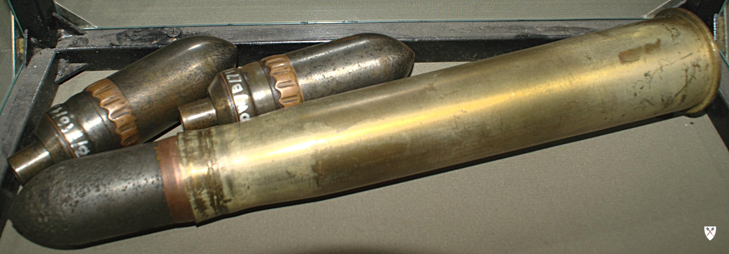 Amunicja armaty przeciwpancernej wz 36